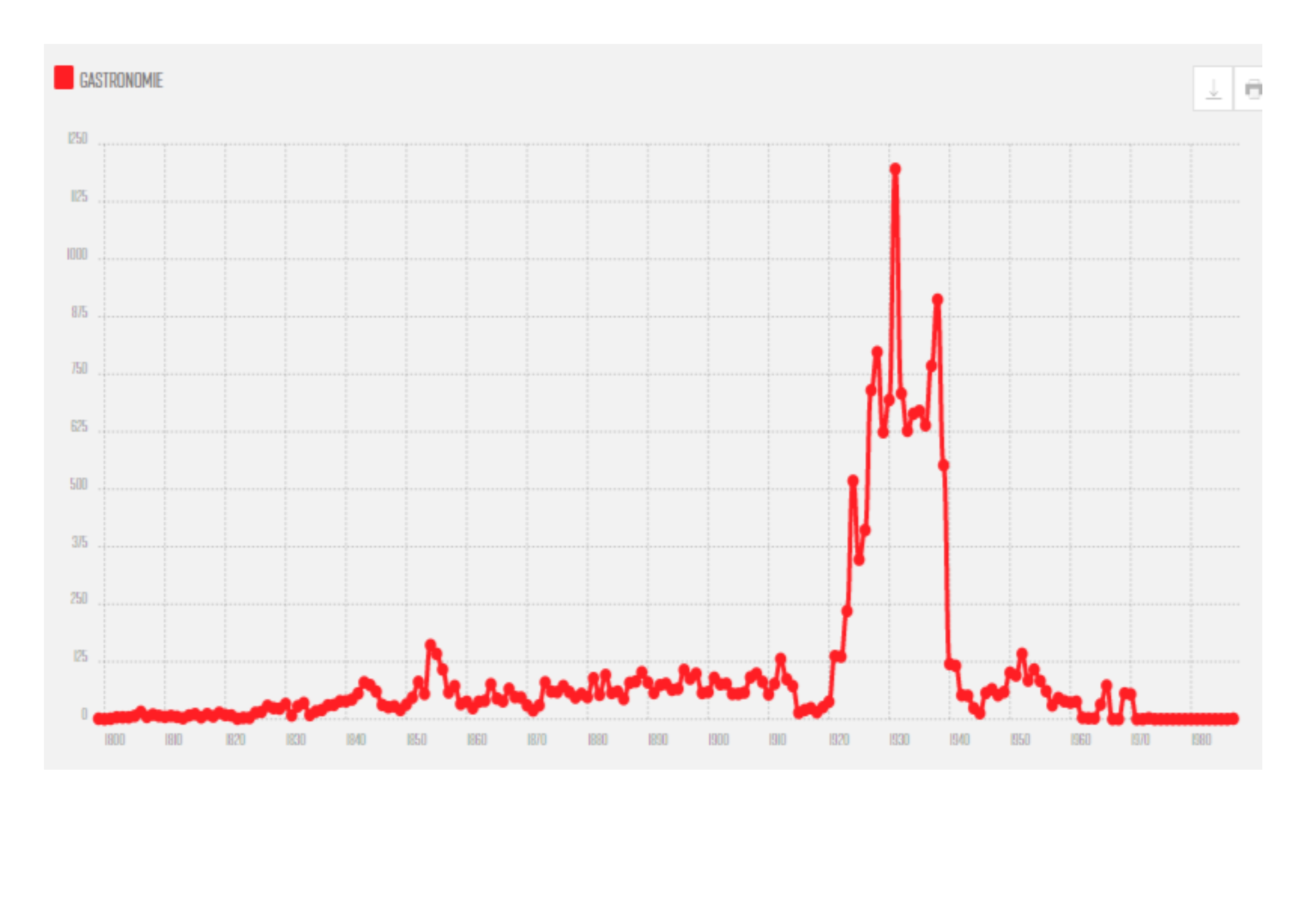 Fréquence du terme gastronomie presse francophone de 1840 à 1970 sur le site Retronews de la BnF